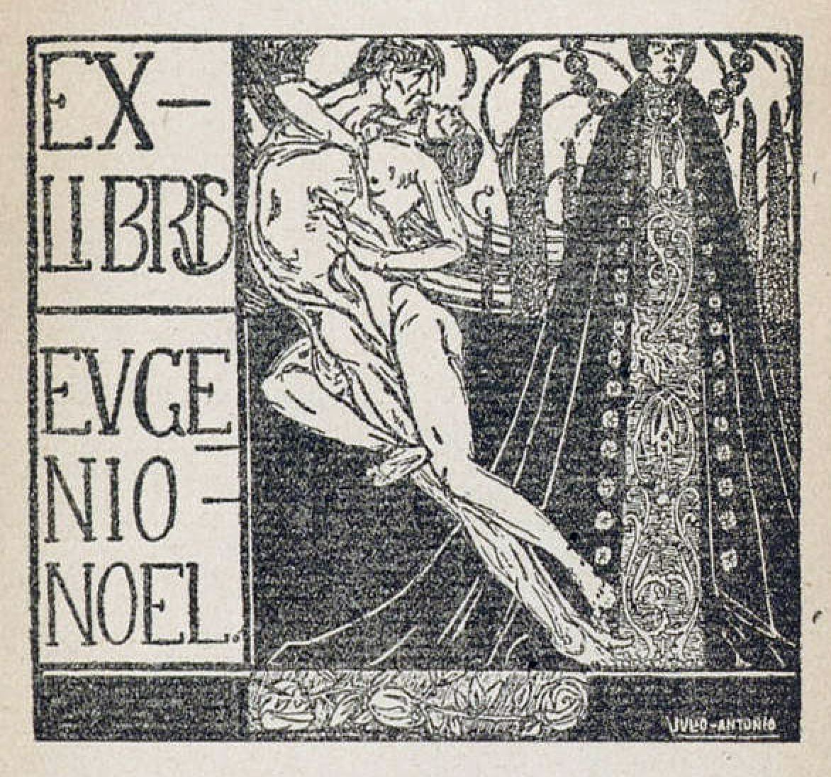 Ex libris en Señoritos, chulos, fenómenos, gitanos y flamencos.